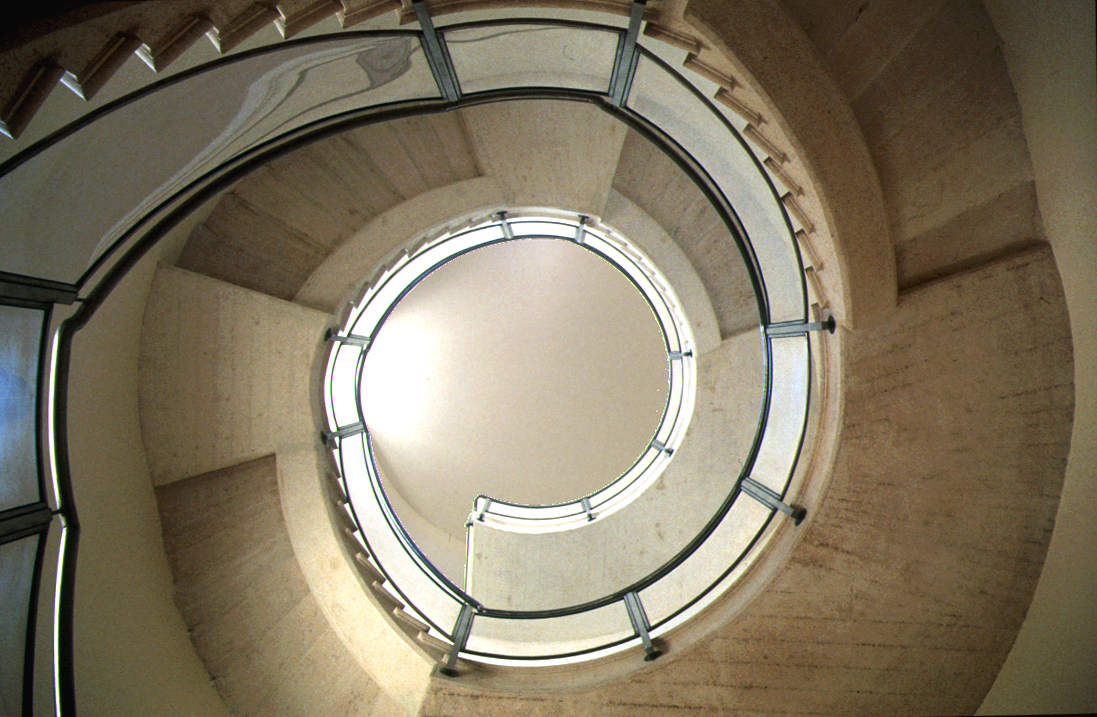 Biblioteca Nazionale Sagarriga Visconti Volpi - MIBAC This is a photo of a monument which is part of cultural heritage of Italy.